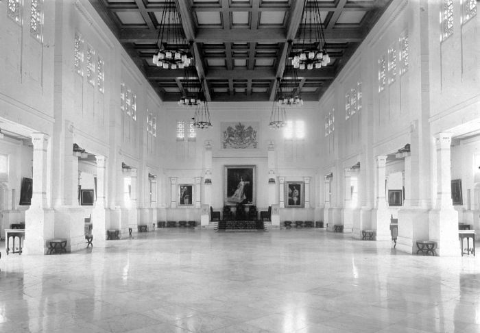 Repronegatief. Audiëntie-zaal in Paleis Rijswijk, Batavia, in the middle a painting of Dutch queen Wilhelmina, to the left of former governor-general Dirk Fock and to the right of former governor-general Johan Paul count van Limburg Stirum